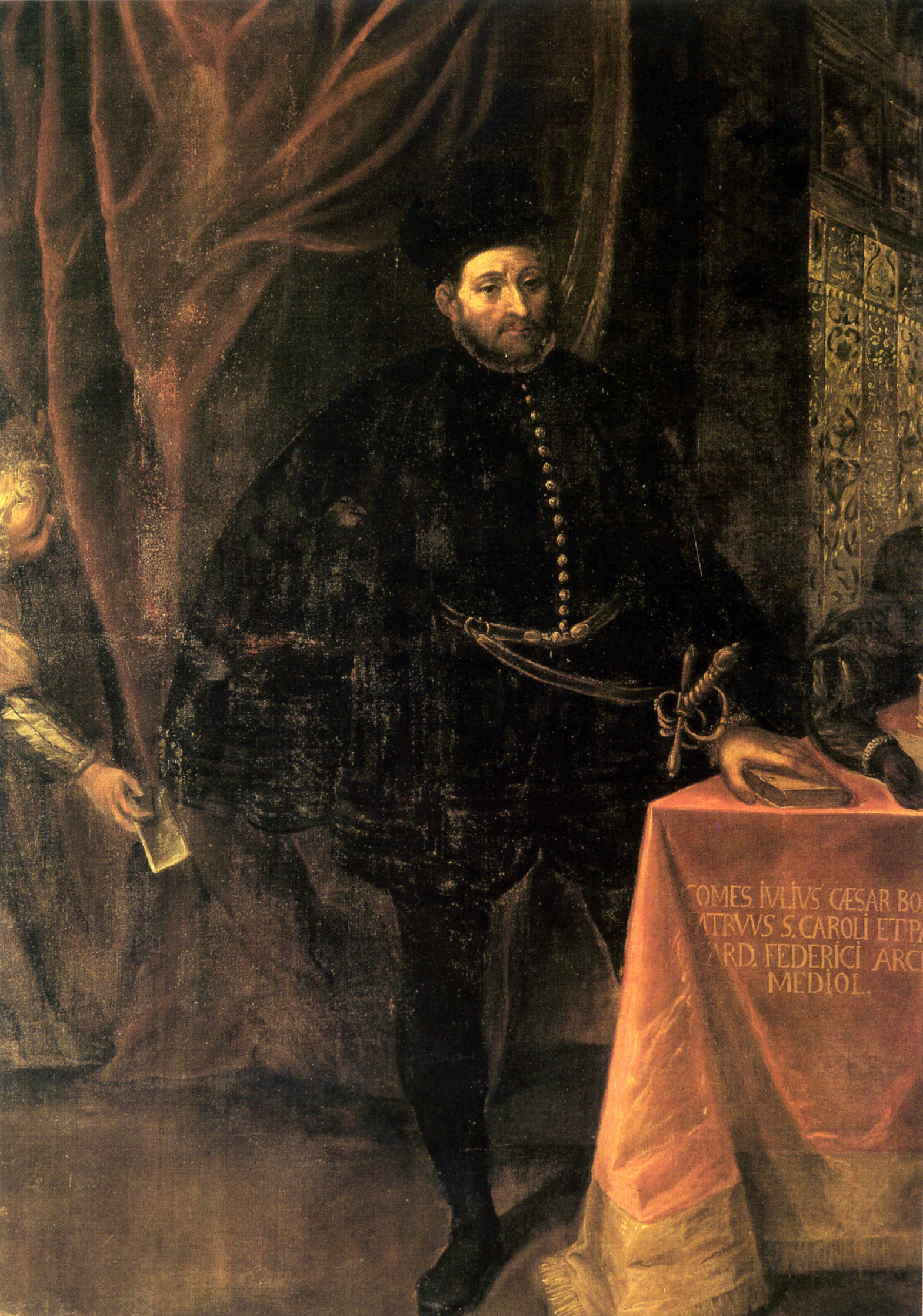 Giulio Cesare Borromeo